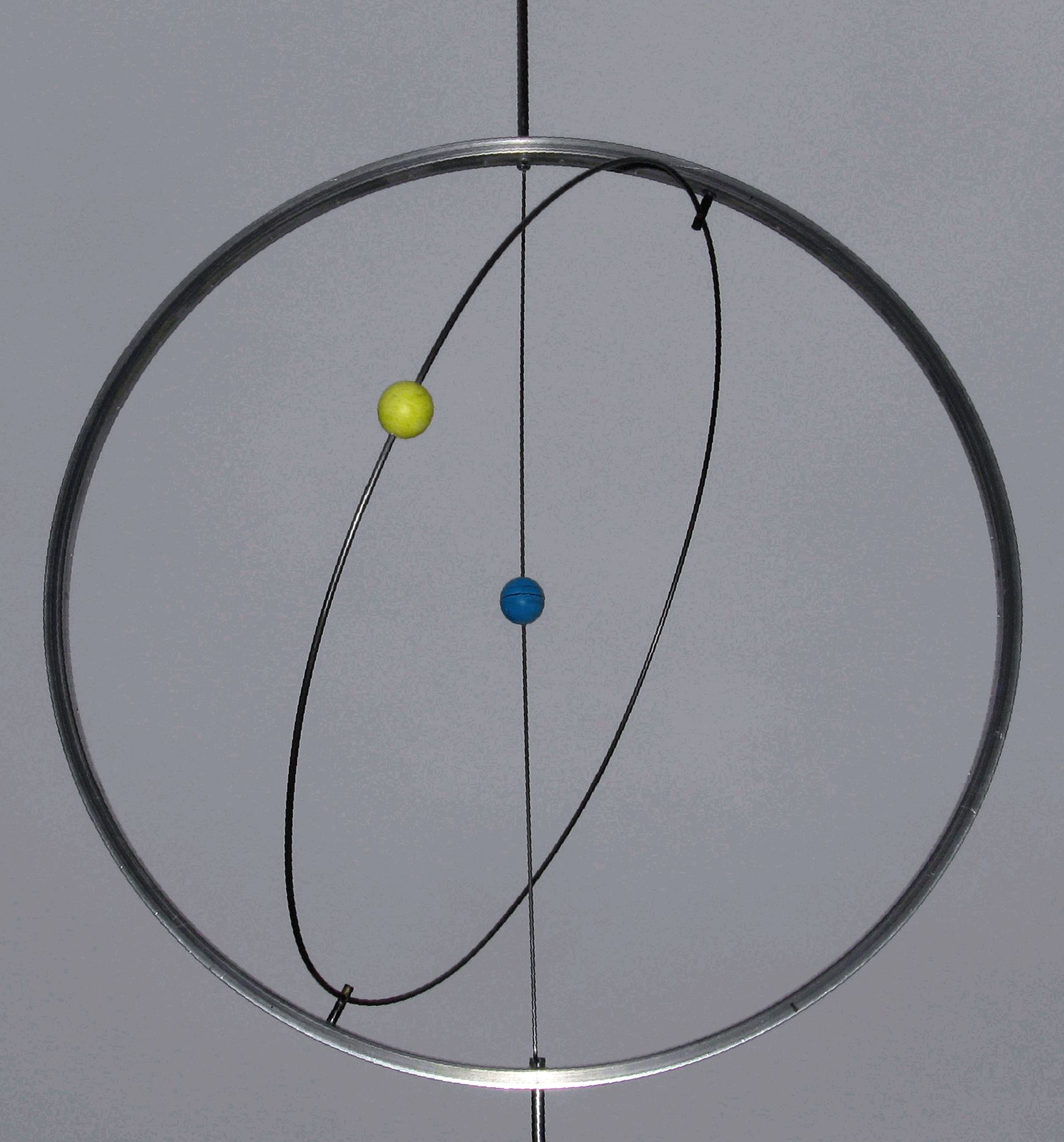 Modell der von Eudoxos erdachten zwei Sphären (hier Ringe) zur Darstellung der Bewegung der Sonne relativ zur Erde: Die erste Sphäre dreht sich um die verlängerte Erdachse. Auf der zweiten Sphäre, die drehbar auf der ersten gelagert ist, ist die Sonne fixiert. Die erste Sphäre dreht sich täglich einmal um die Erde und nimmt die Sonne mit. Die zweite Sphäre dreht sich einmal im Jahr um die erste. Da die Achsen der beiden Sphären untereinander einen Winkel von 23,5° (Schiefe der Ekliptik) bilden, macht die Sonne im Jahr eine Auf- und Abbewegung, entstehen Sommer und Winter.